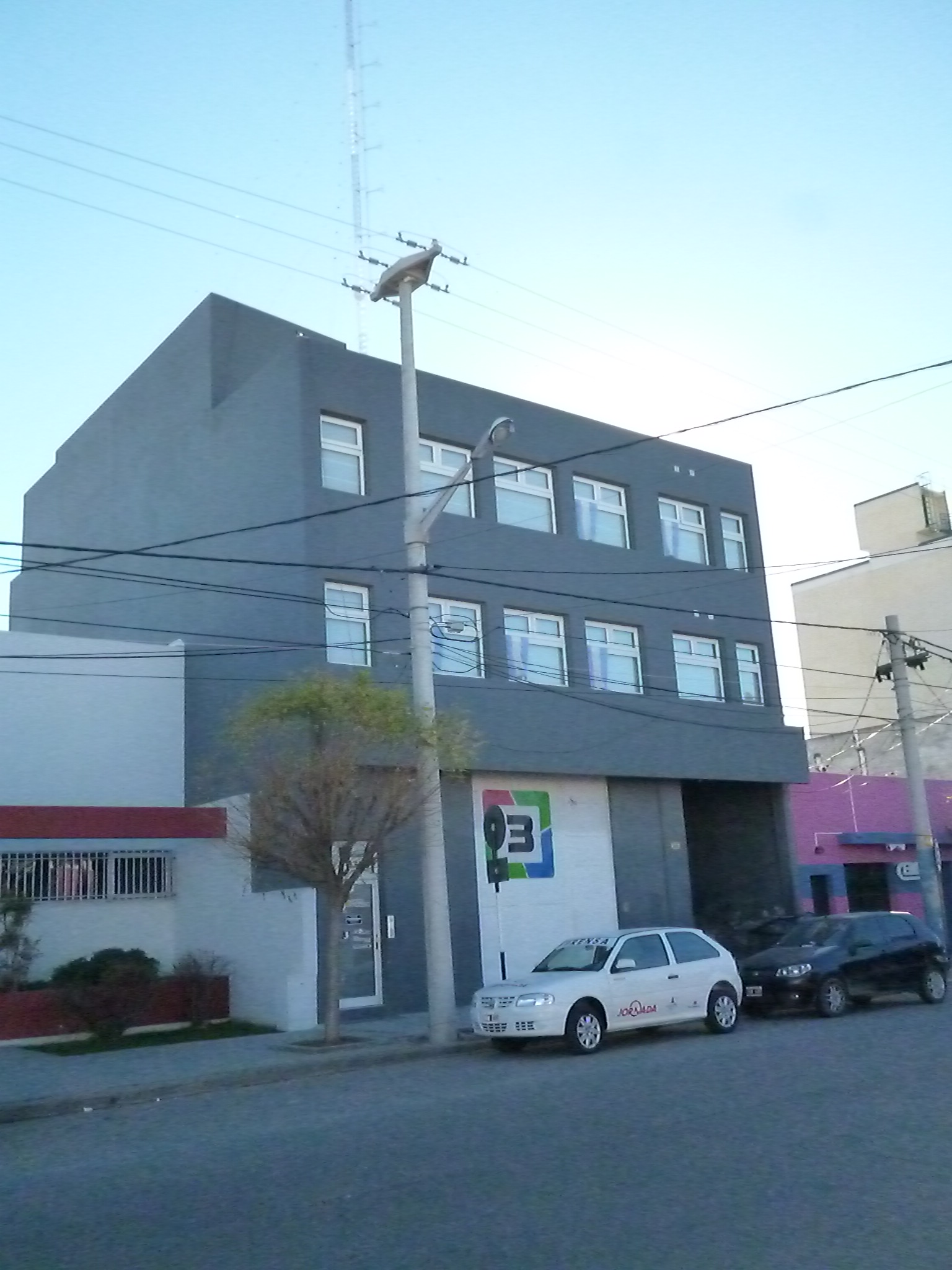 Estudios Canal 3 Trelew